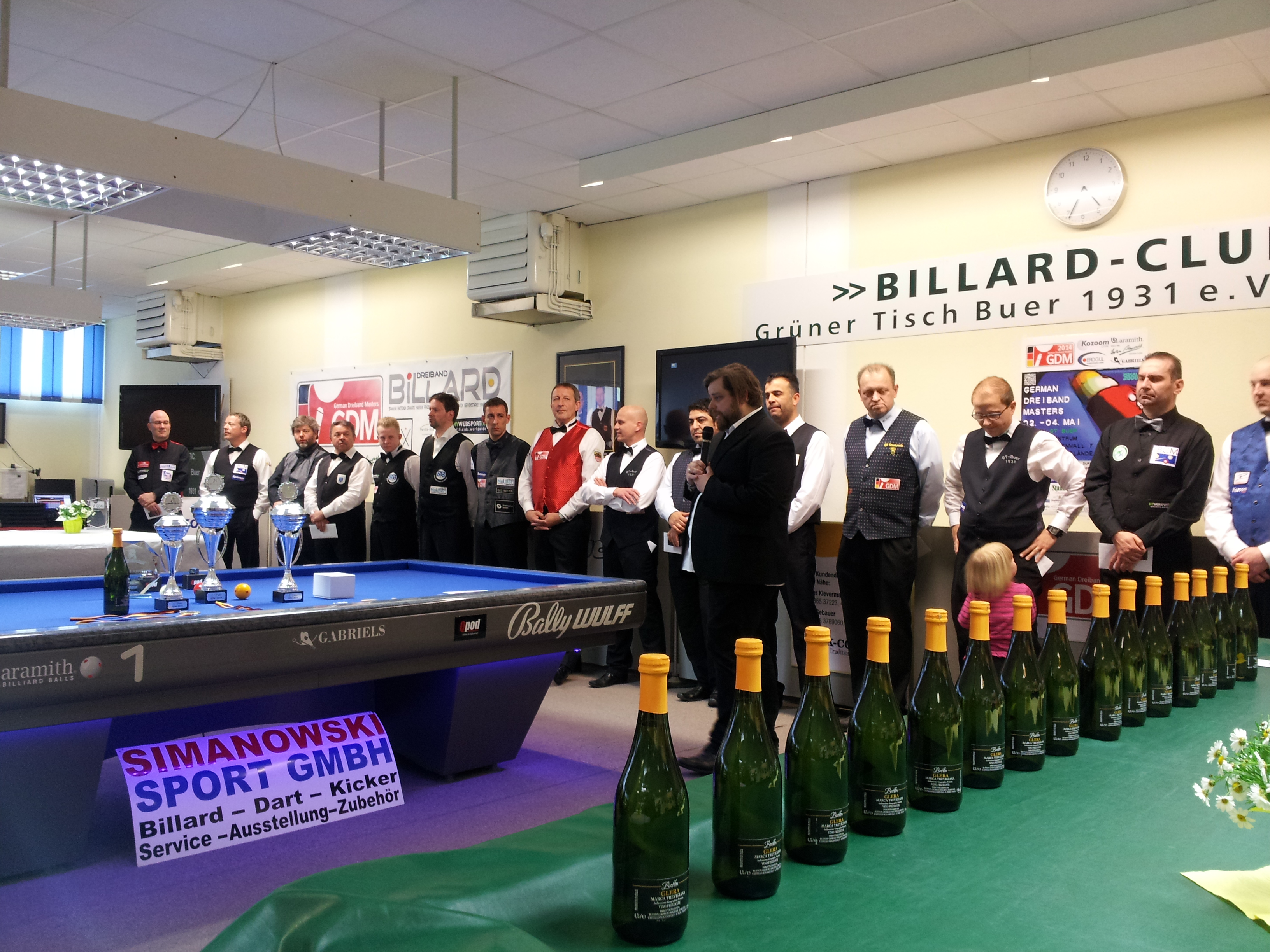 German Dreiband Masters 2014 in Herten.